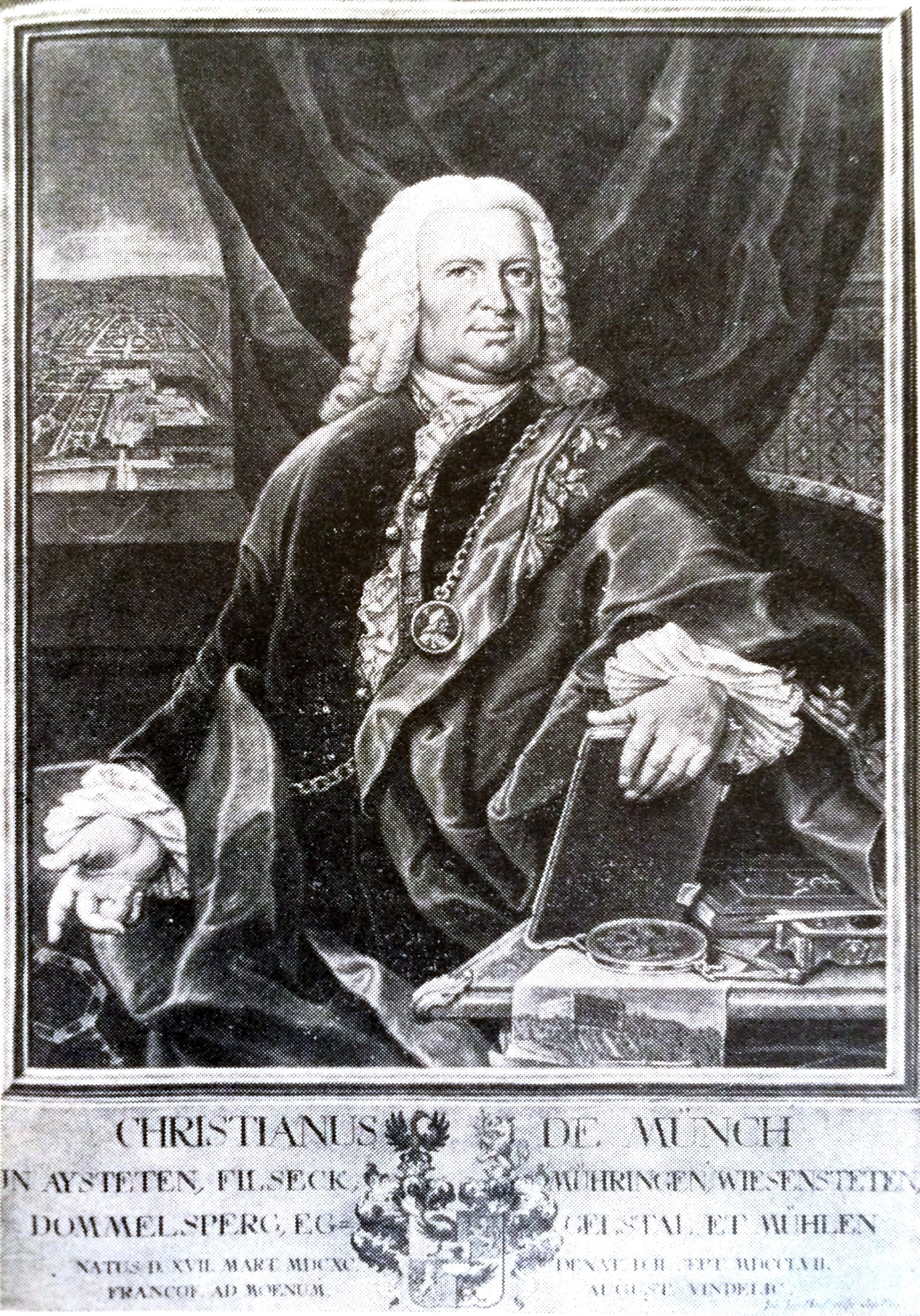 Christian von Münch (1690-1757) auf Aystetten, Filseck und Mühringen